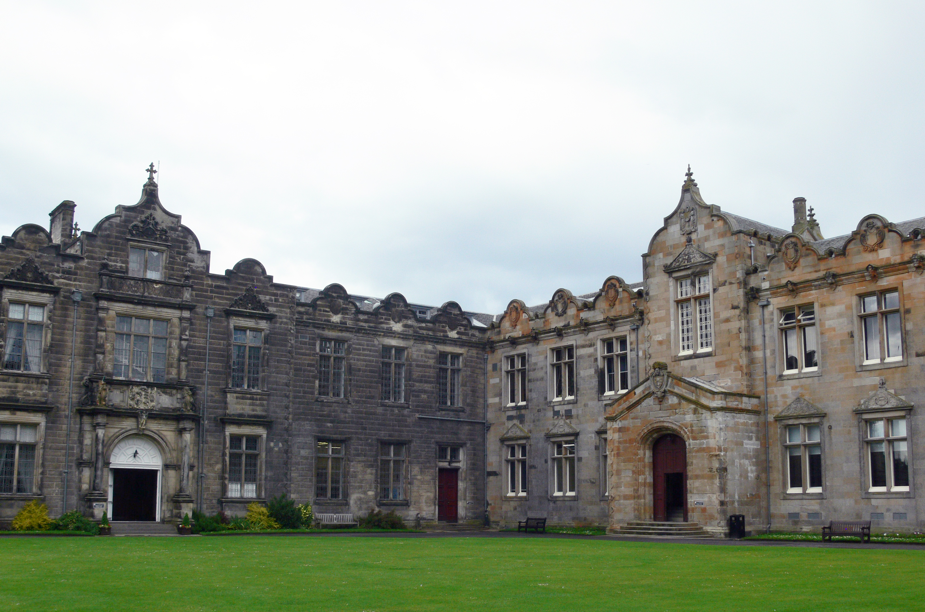 St Andrews